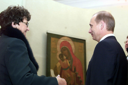 ВЛАДИМИР. С генеральным директором Владимиро-Суздальского музея-заповедника Алисой Аксеновой во время осмотра экспозиции музея.